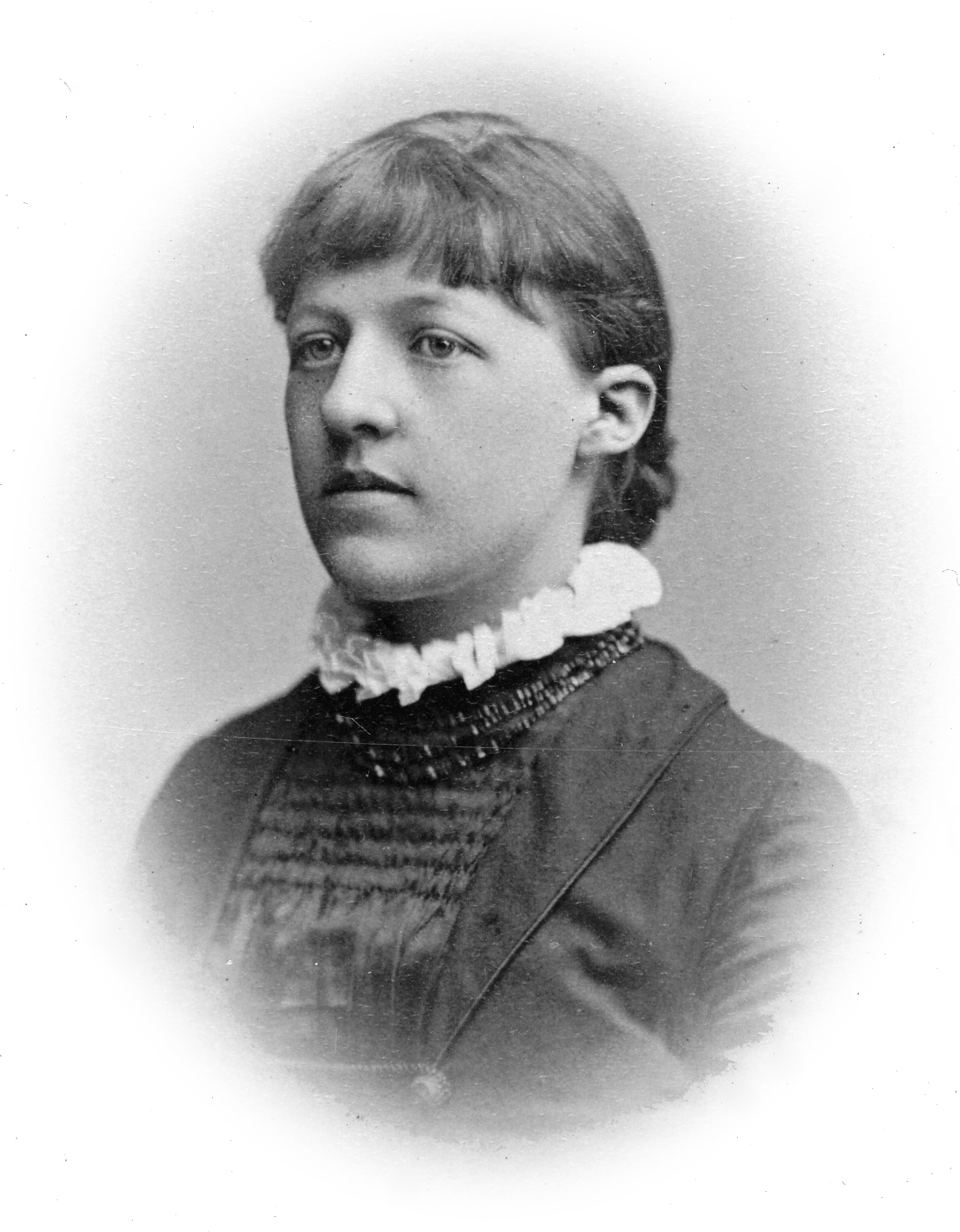 Georgina Sommelius, operasångare 1882